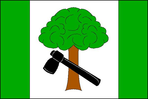 Vlajka obce Vápenná